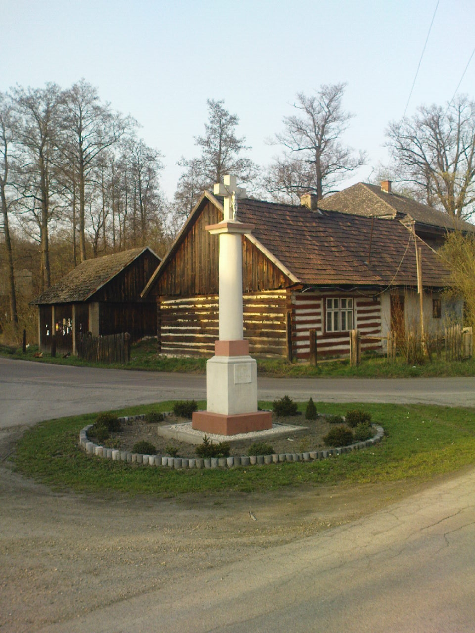 Krzyz i stary dom w Okleśnej